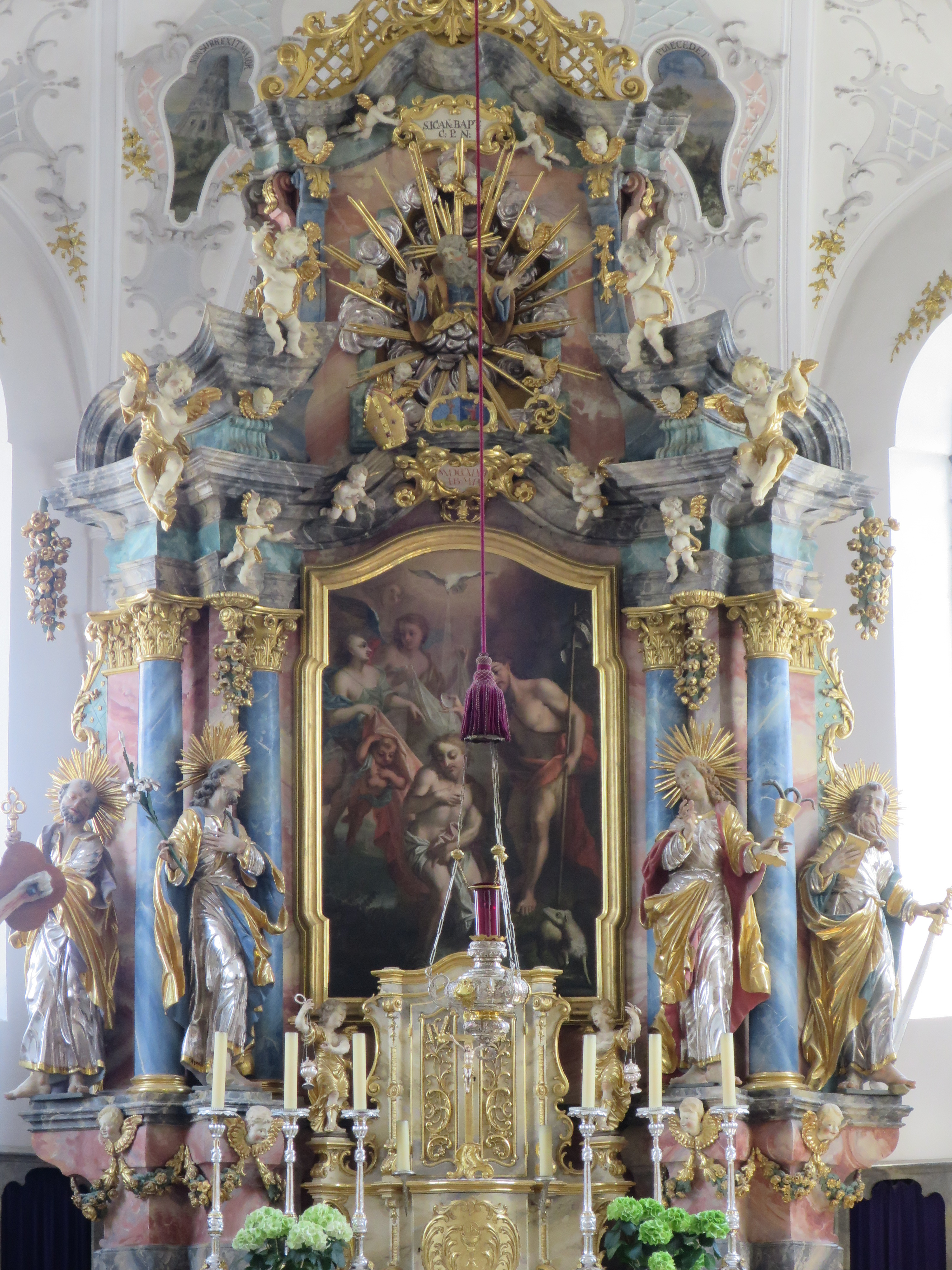 Bild der Taufe Jesu von J. Baader. Figurenː Josef, Johannes Ev., Petrus und Paulus (Luidl-Werkstatt).